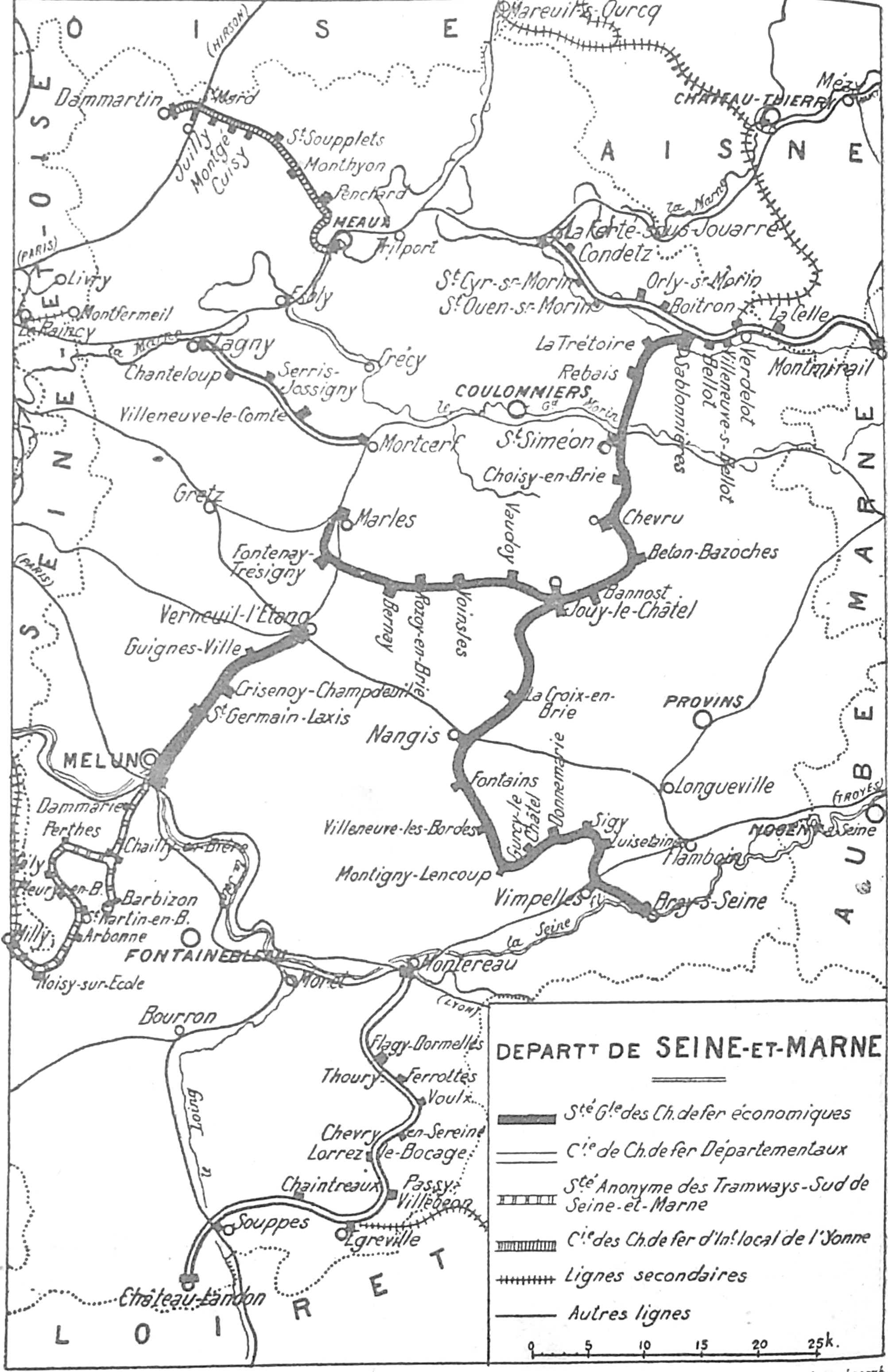 Plan du réseau des VFIL du département de la Seine-et-Marne en 1928